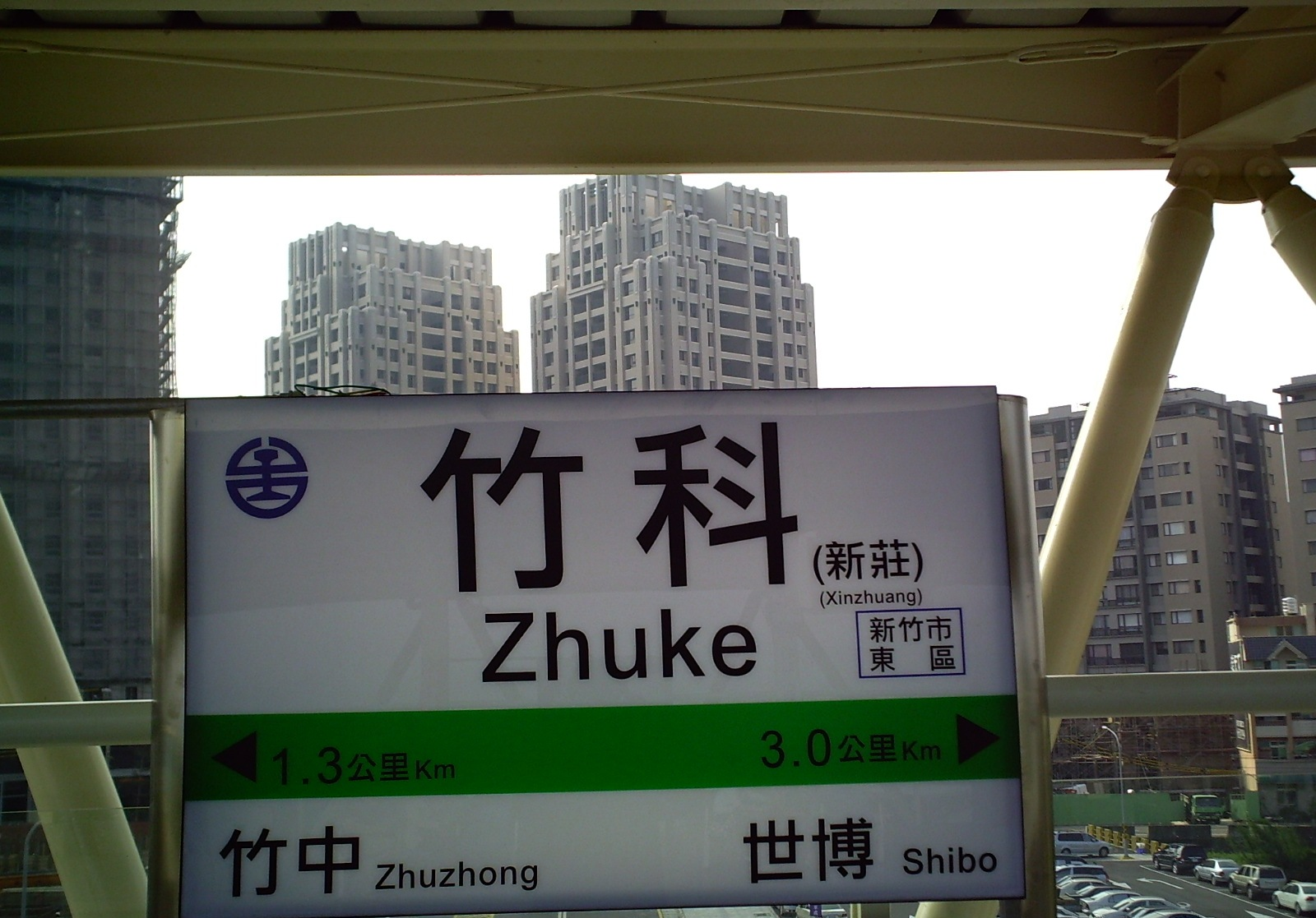 臺鐵新莊車站改名前的站名牌，標示著竹科（新莊）。